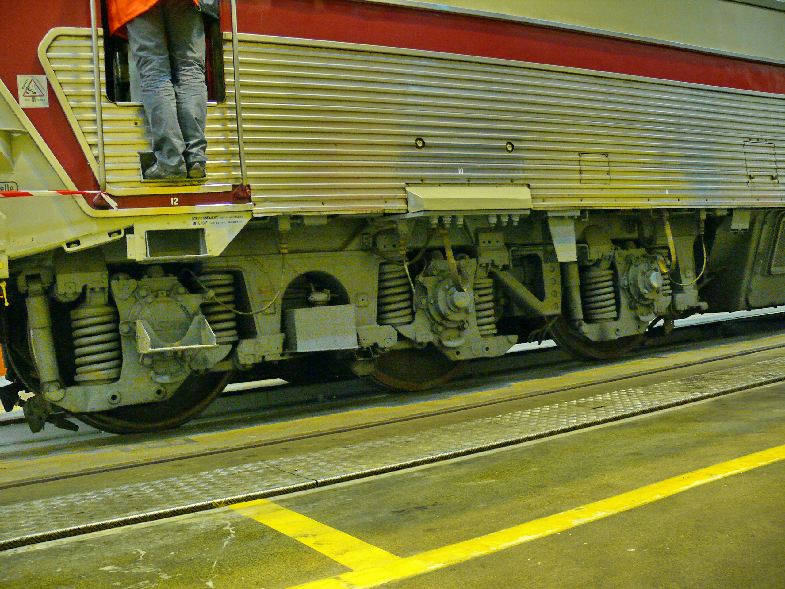 Bogie de la CC 40110. Cette locomotive, classée monument historique, appartient désormais au MFPN. Elle est vue exposée au dépôt des Joncherolles